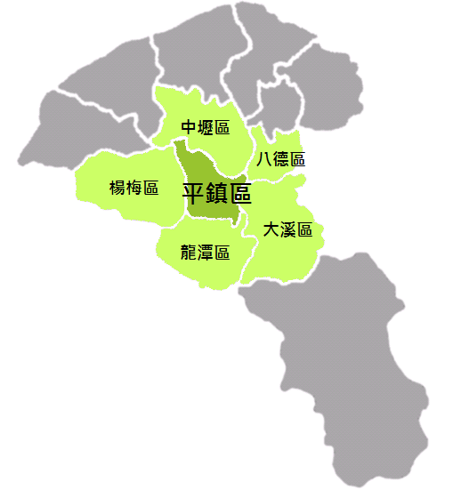 平鎮區位置圖